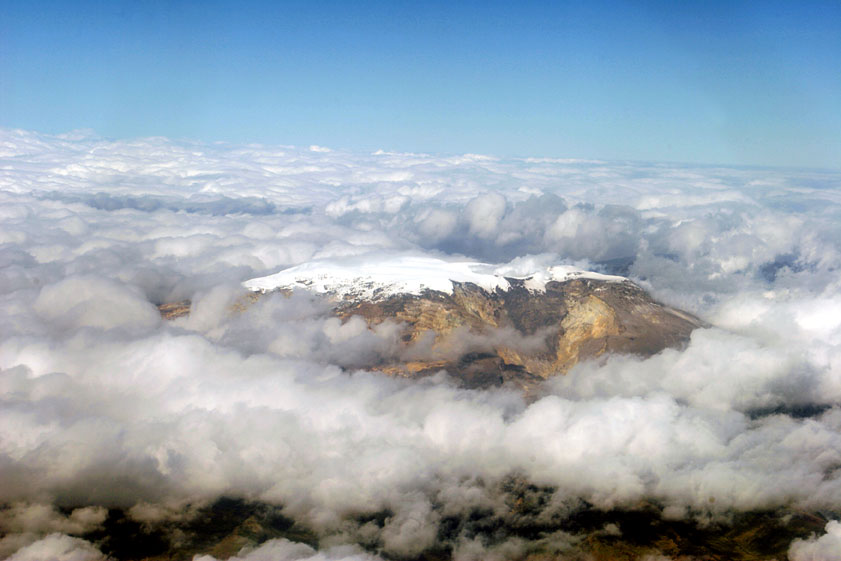 Nevado Santa Isabel en Colombia, tomada desde el avion presidencial